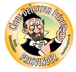 Claus Deleuran prisen segl (guld)